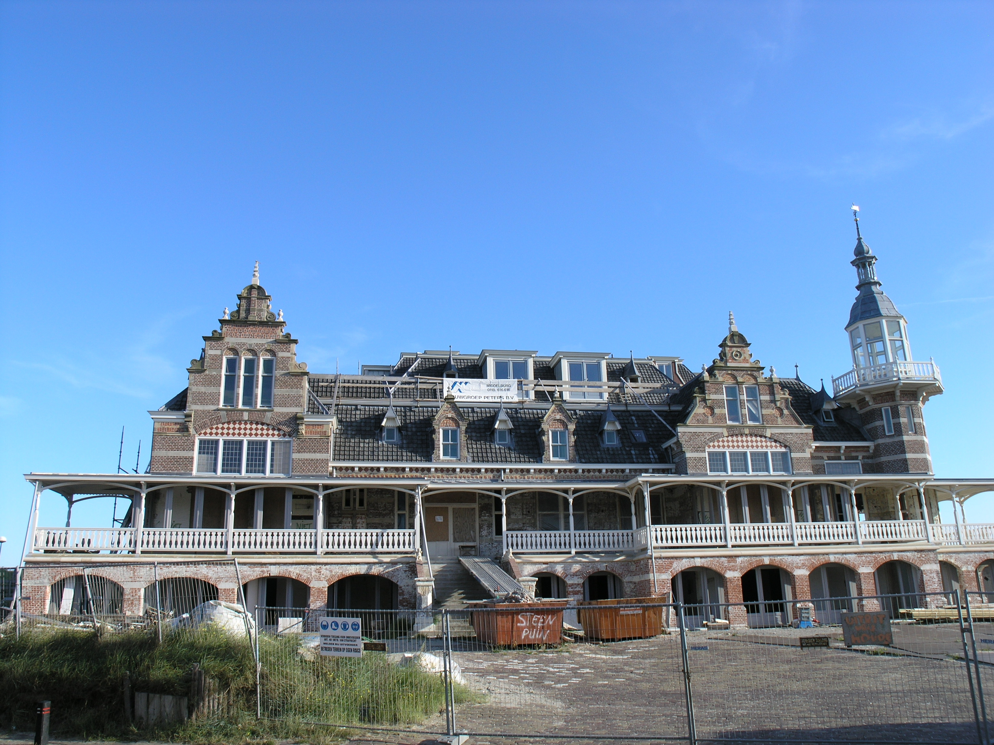 Badpaviljoen werkzaamheden (Augustus 2007)